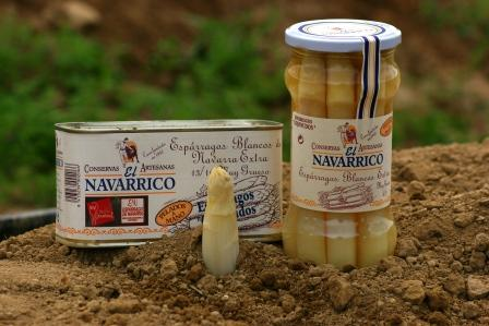 Espárrago Blanco de Navarra D.O.